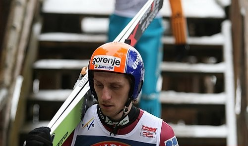 Primož Pikl